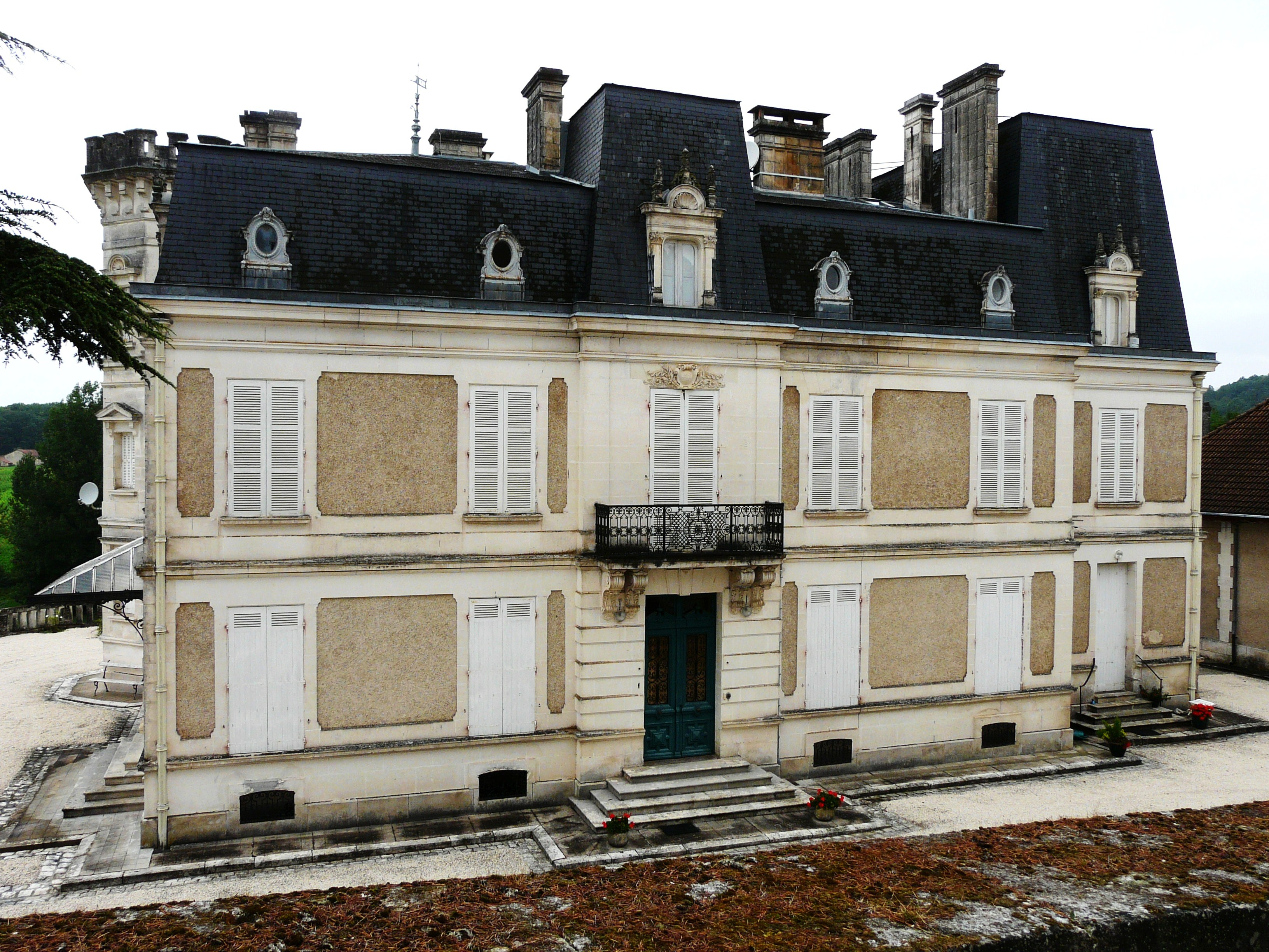 Le château de Saint-Crépin, Saint-Crépin-de-Richemont, Dordogne, France